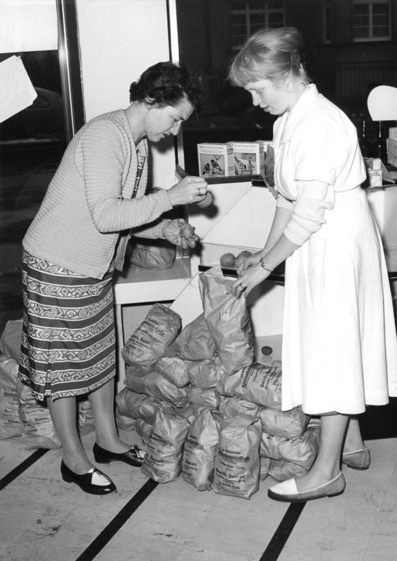 Bonn, 24.9.1957 Hausfrau kauft Kartoffeln in Tüten ein, bei der Firma Edeka